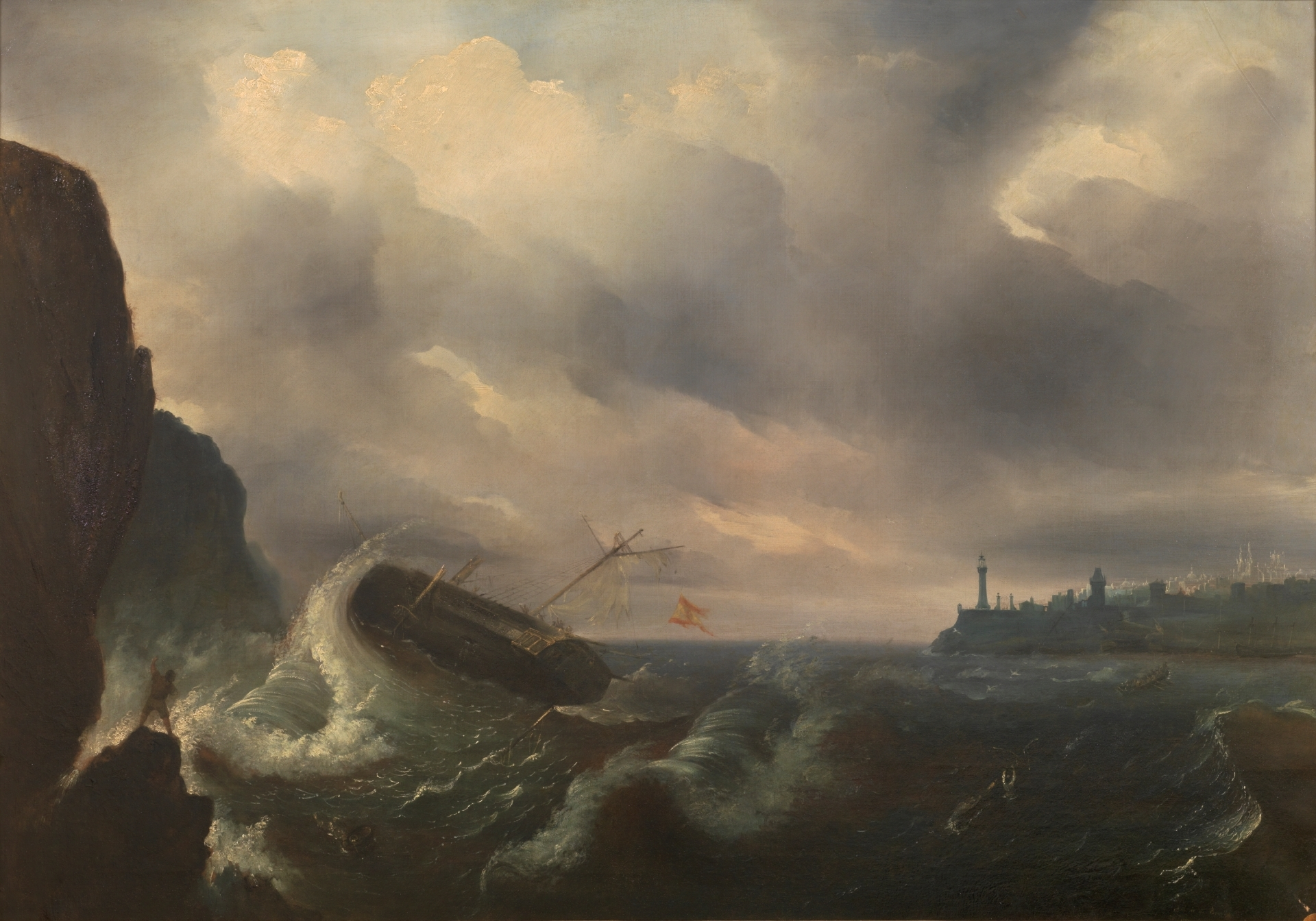 Pintura de Antonio Brugada (1804-1863) que representa el naufragio de un galeón (1841)